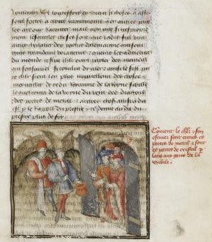 Illustrazione riportata da Antoine de La Sale nel "Paradiso della Regina Sibilla" (1420), raffigurante il cavaliere tedesco e il suo scudiero sulla soglia dell'ingresso del regno della Sibilla